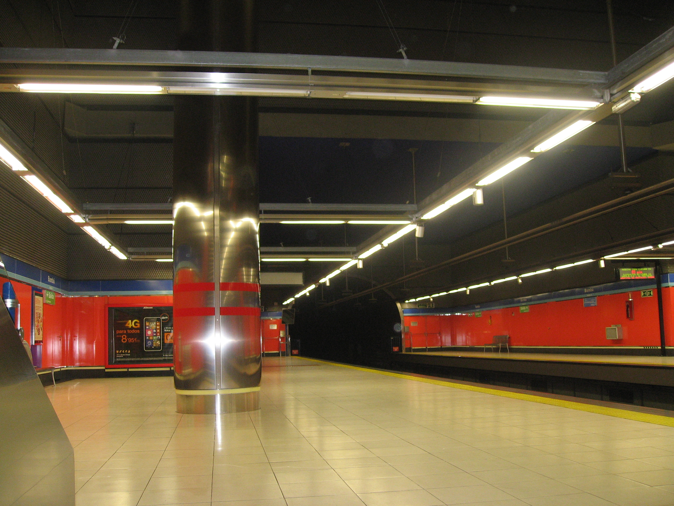 Vista de los andenes de la estación de Bambú